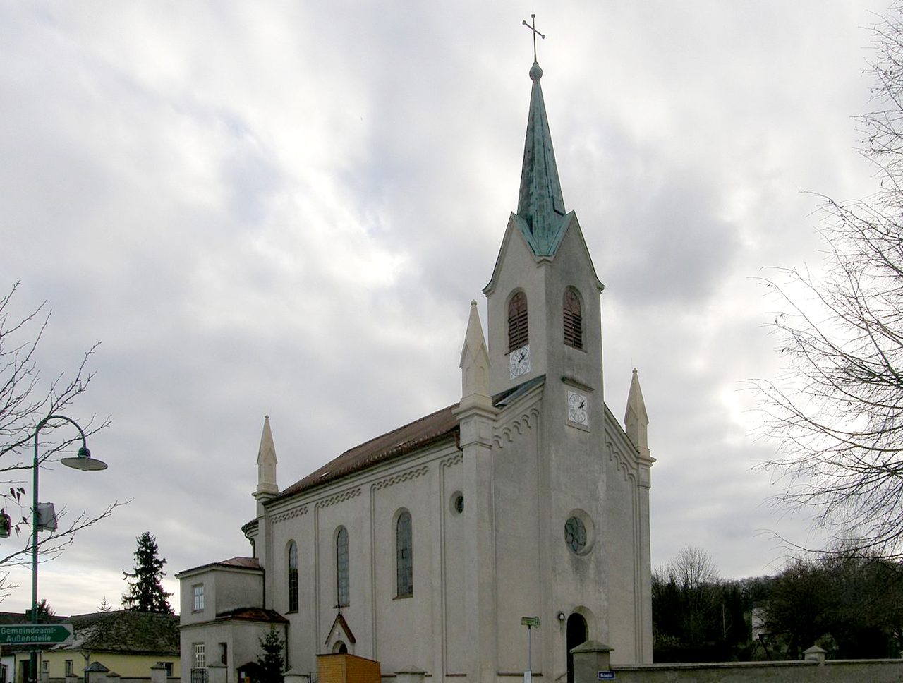 Kath. Pfarrkirche hl. Leonhard und Aufbahrungshalle in Unterolberndorf